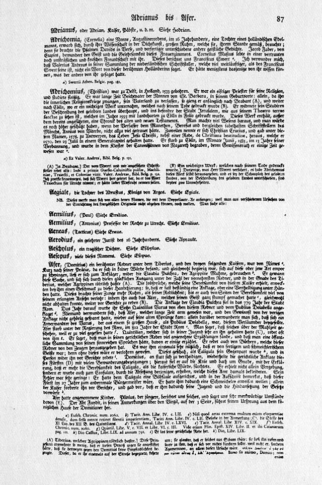 Beispielseite aus dem "Historischen und kritischen Wörterbuchs" (Gottsched), der deutschen Ausgabe des Dictionnaire historique et critique von Pierre Bayle